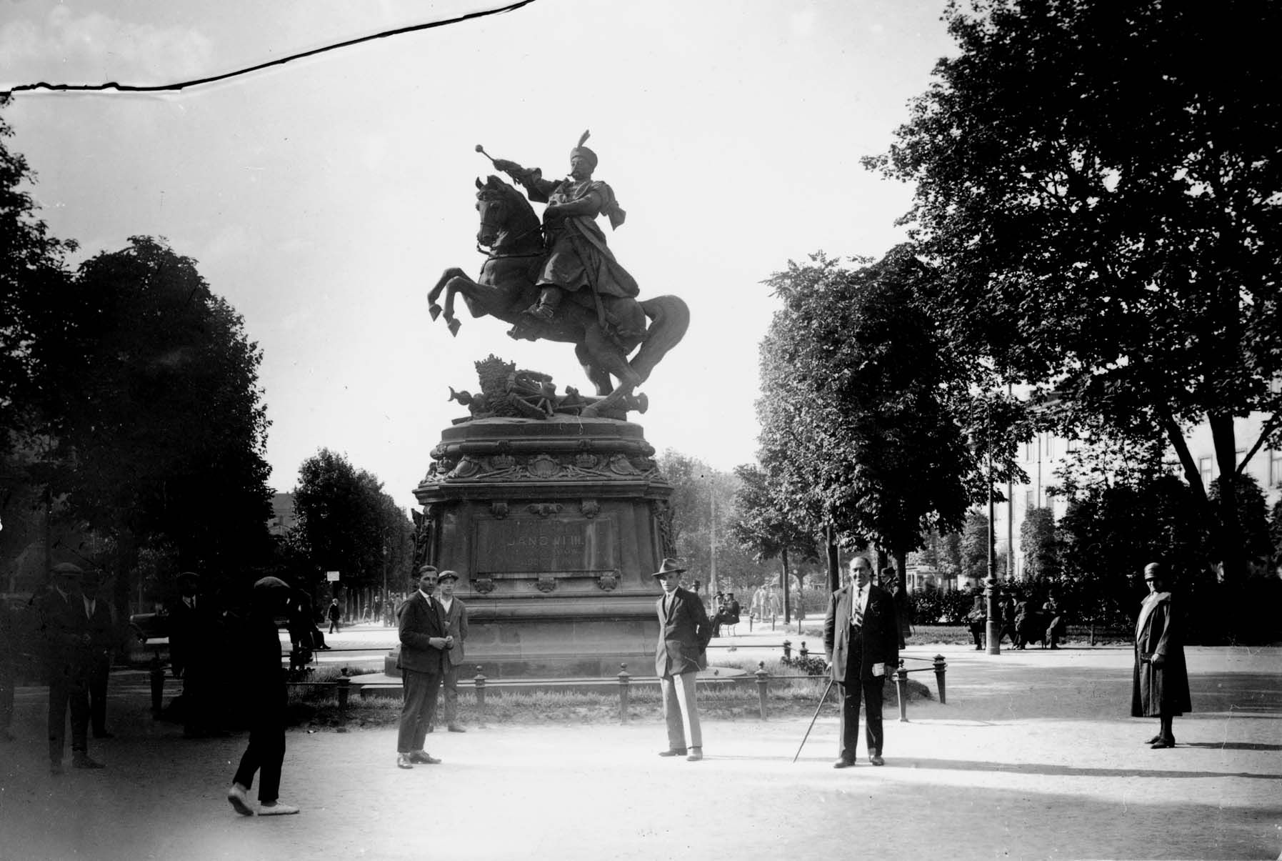 Памятник Яну Собескому во Львове (фото начала XX века)